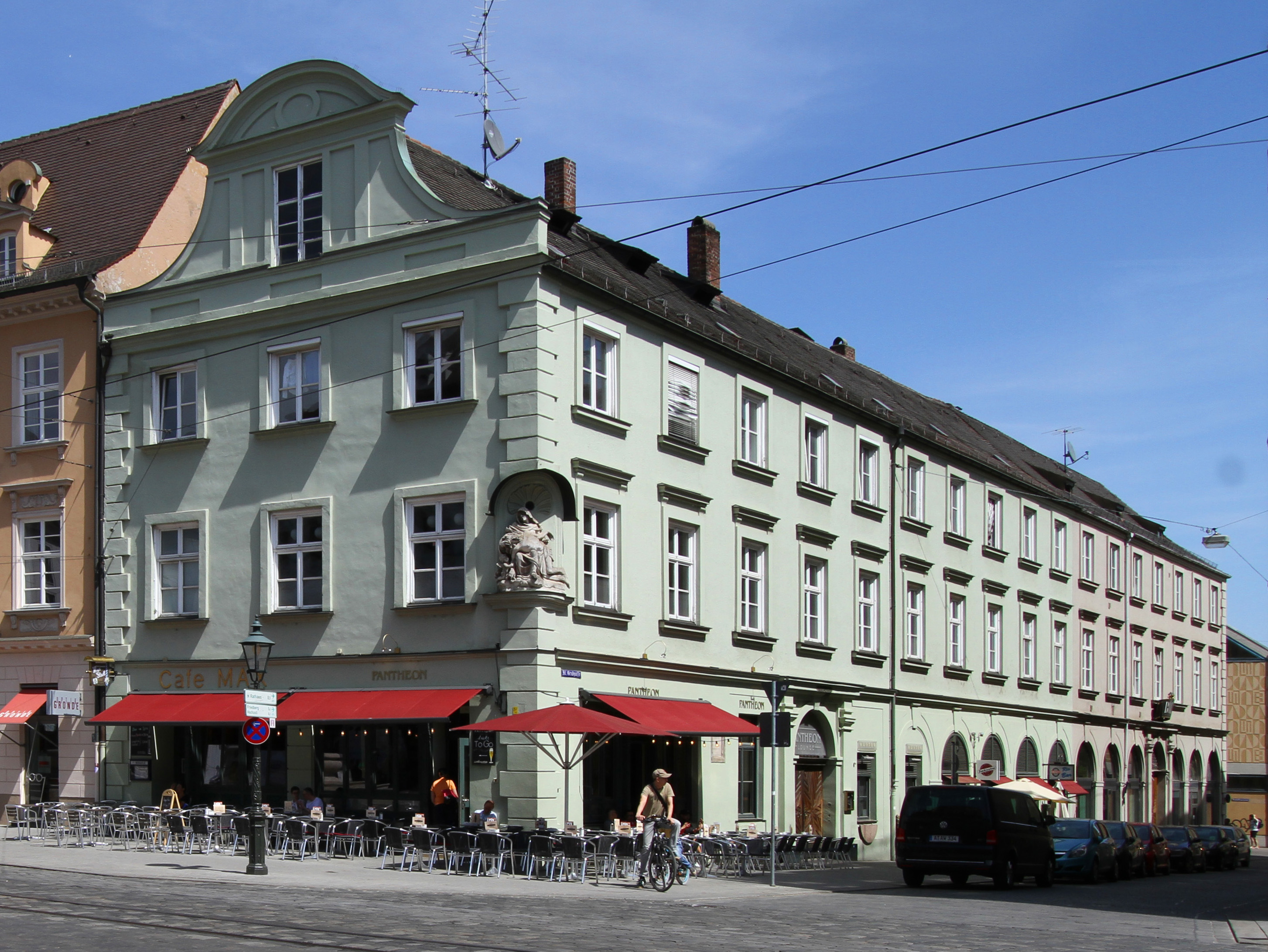 Maximilianstraße in Augsburg